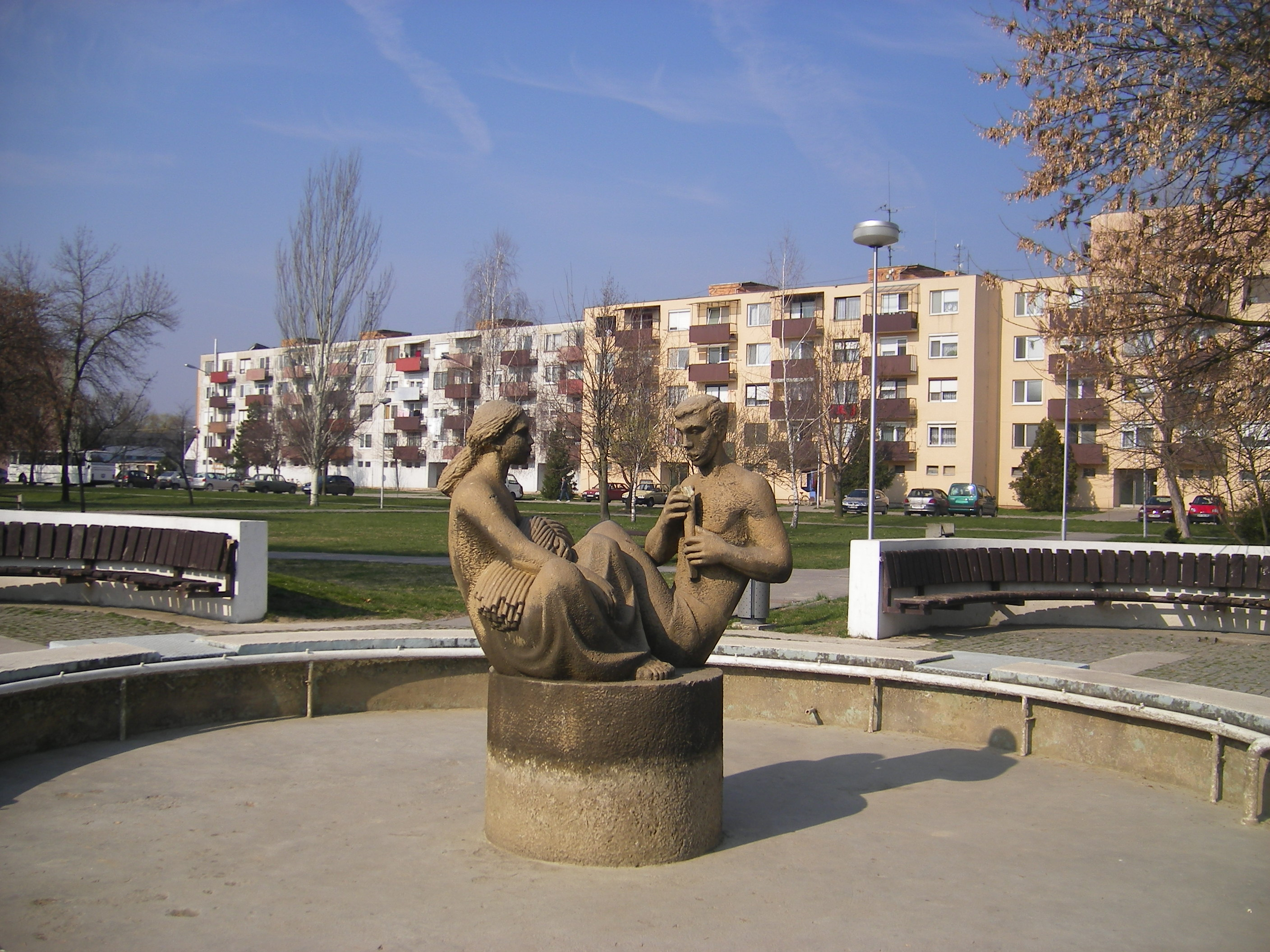 Gúta - szobor a városi parkban